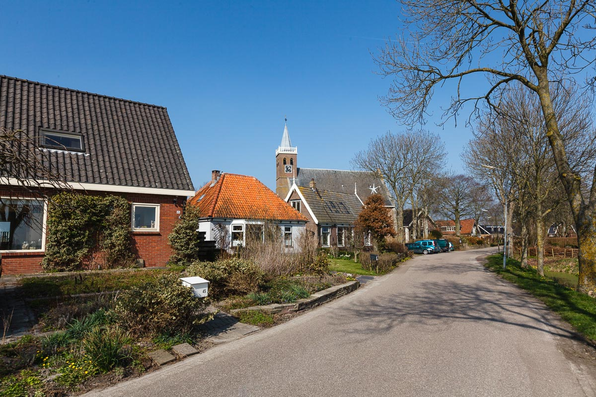 Valkkoog, dorpssstraat